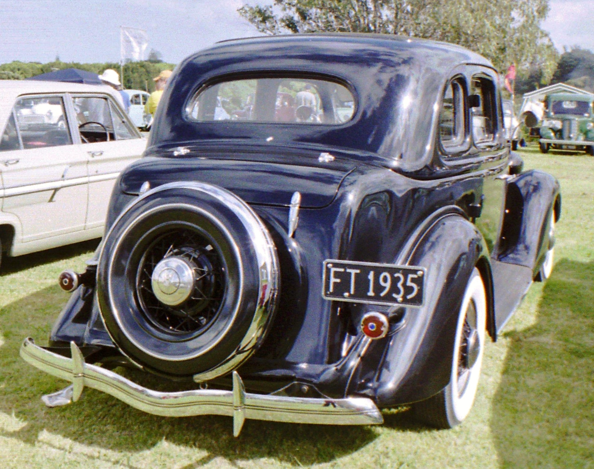 1935 Ford Sedan